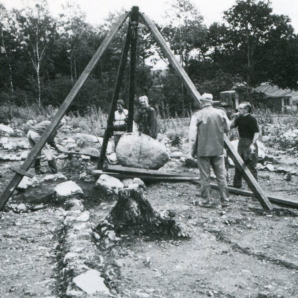 Undersökningen av Domarringen i Skärholmen